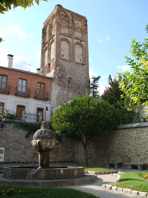 Torre mudéjar de la desaparecida iglesia de Santa Marina (Cuéllar)